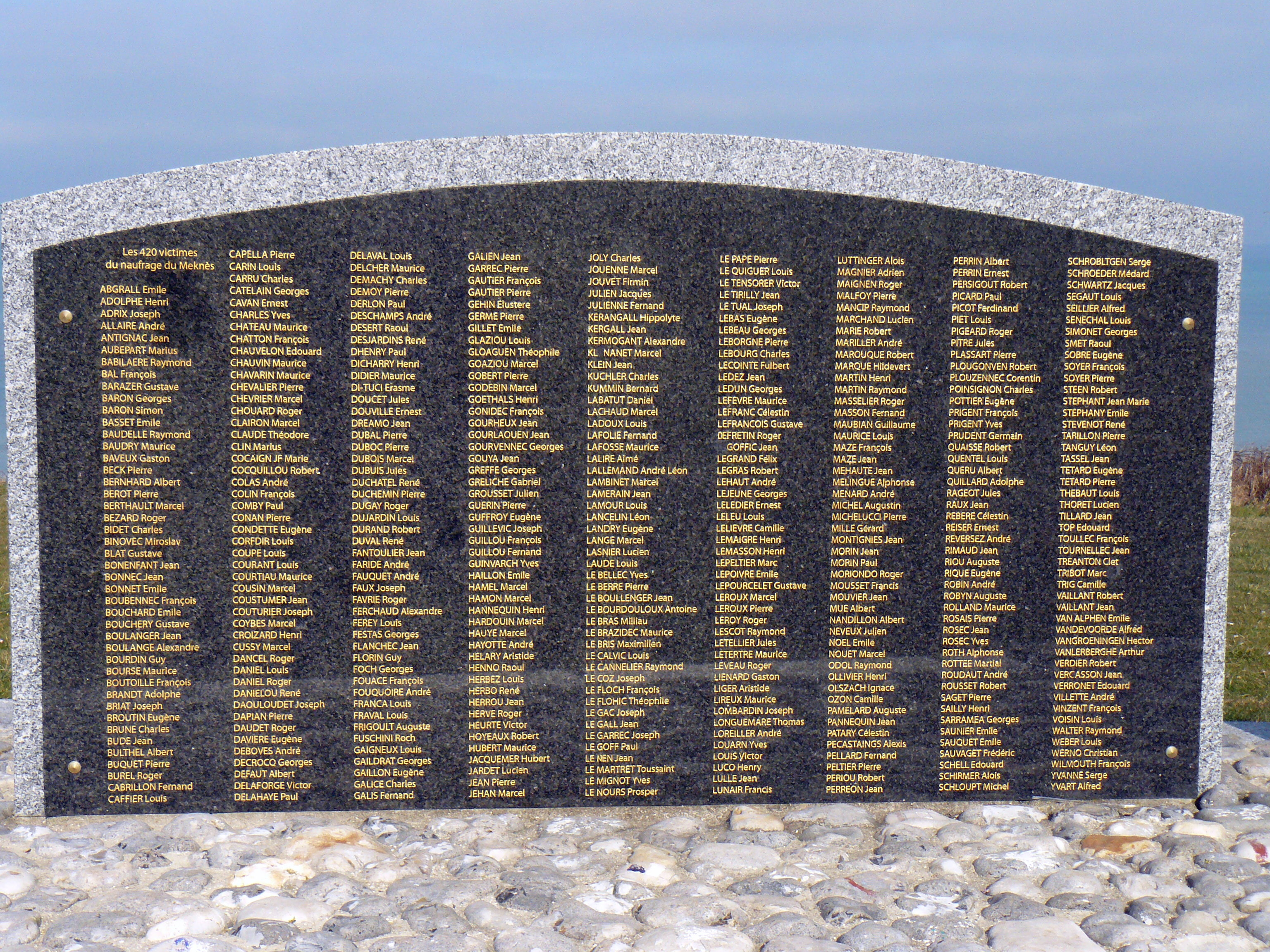 Monument érigé en souvenir des victimes du naufrage du paquebot Meknès, coulé par une vedette allemande le 24 juillet 1940. Saint-Martin-en-Campagne, Seine-Maritime, France.